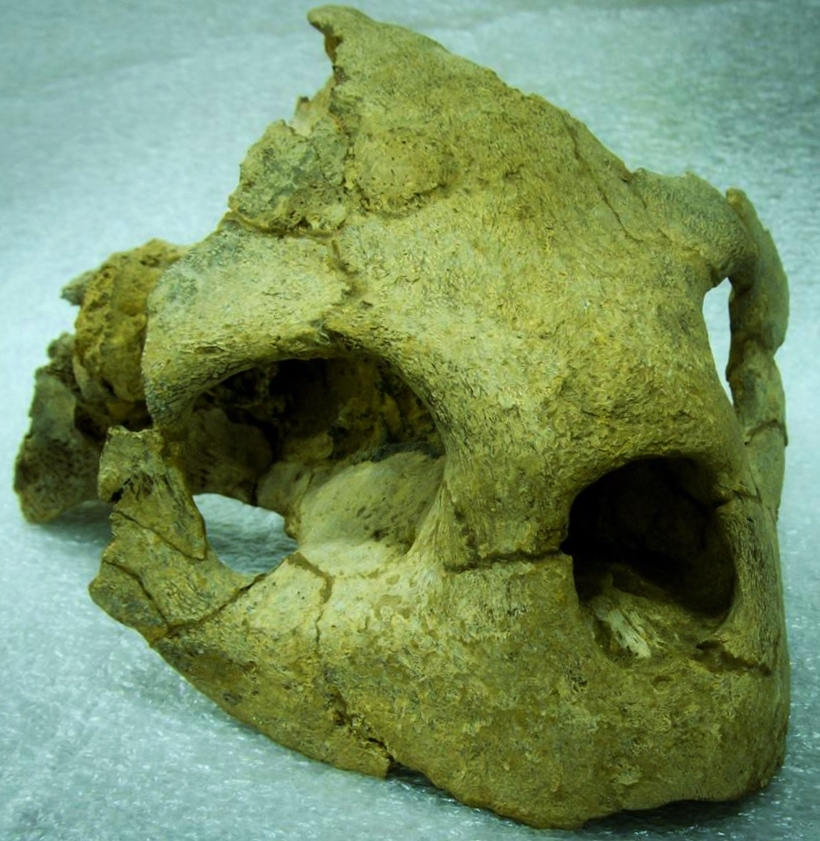 Fossil of Pacifichelys, an extinct reptile - Museum of Natural History Lima